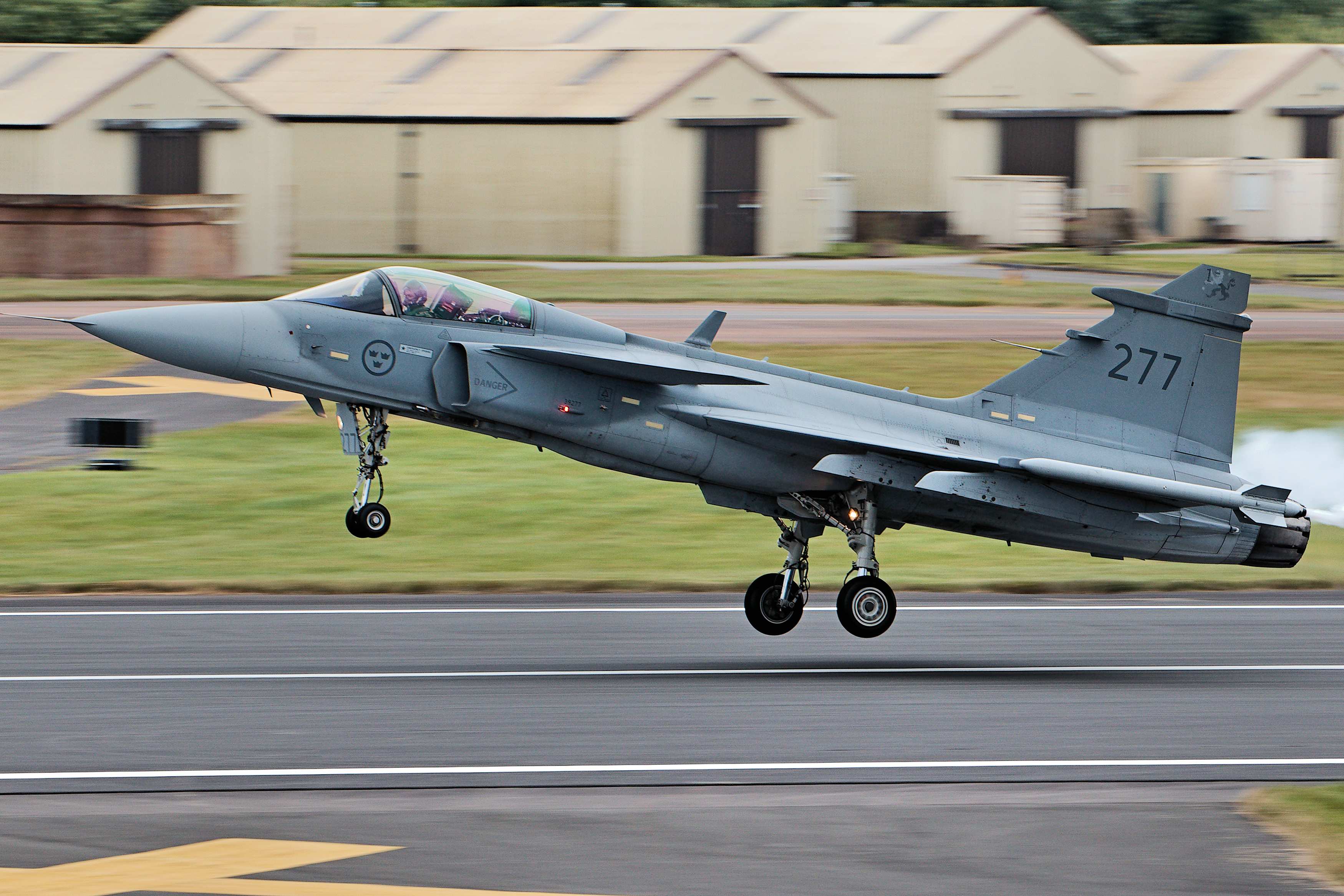 Gripen - RIAT 2016